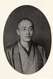 高橋誠一郎肖像。明治17年(1884)新潟県生、昭和57年(1982)没。97歳。第1次吉田内閣文相、東京国立博物館長、日本芸術院院長、日本学士院院長等を歴任。文化勲章受賞。